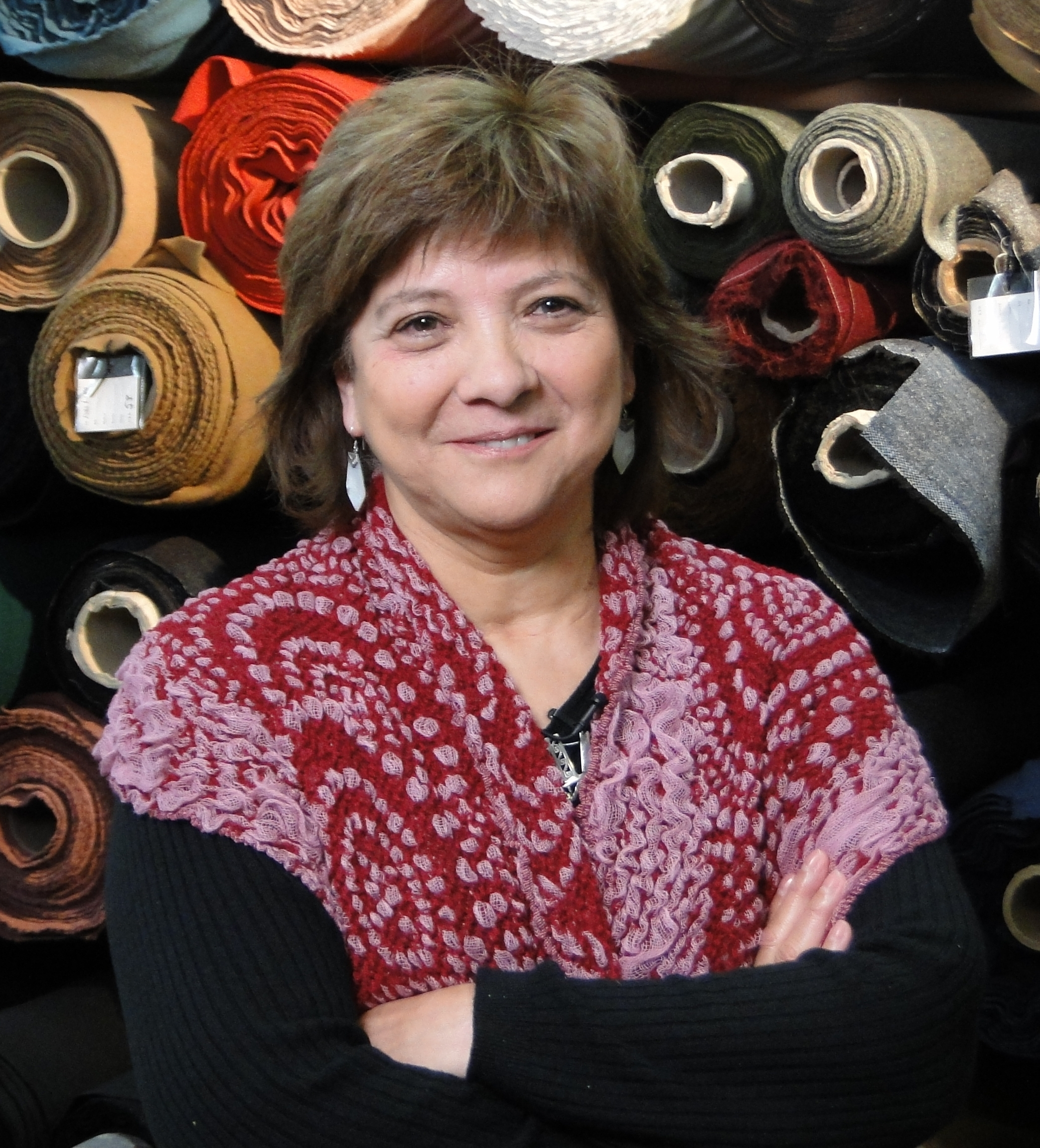 Mirta Zaida Lobato es una destacada historiadora argentina, profesora asociada de la Universidad de Buenos Aires, especializada en historia social, cultural y política del mundo del trabajo y de las relaciones de género en Argentina y América Latina en el Siglo XX.